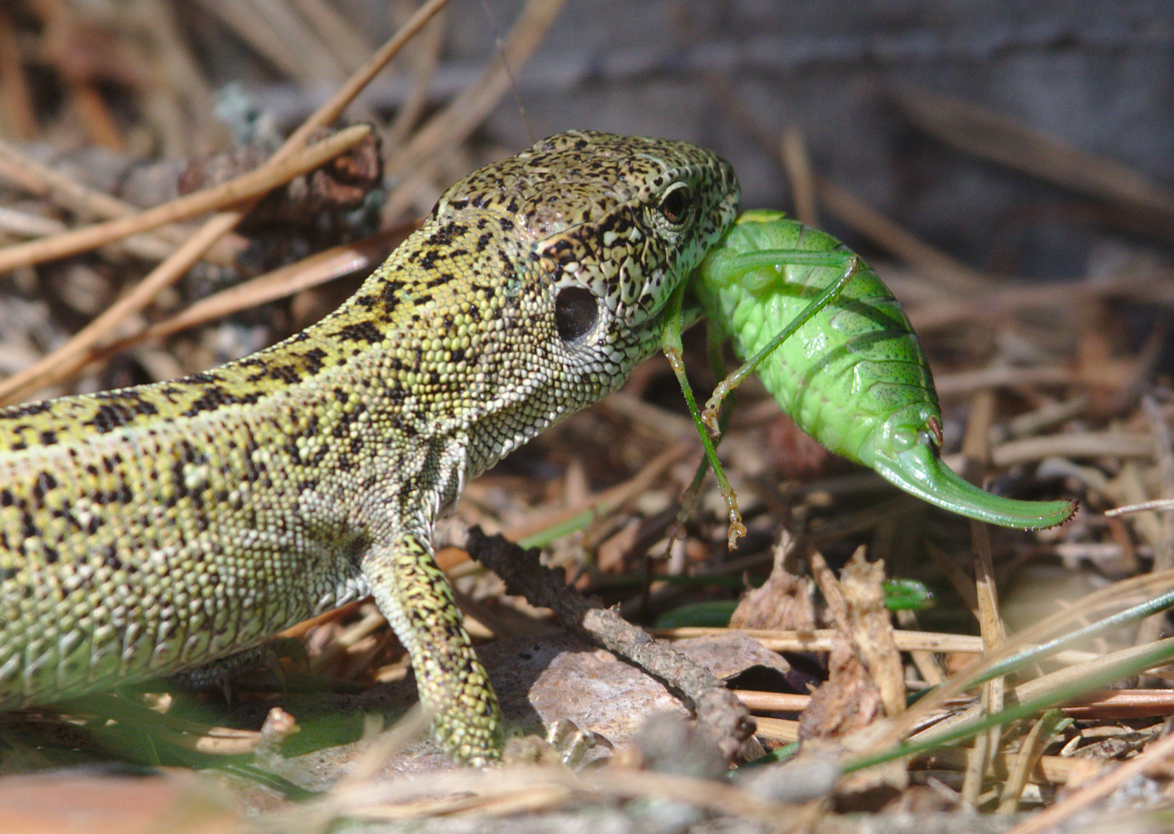 Jaszczurka zwinka podczas posilku